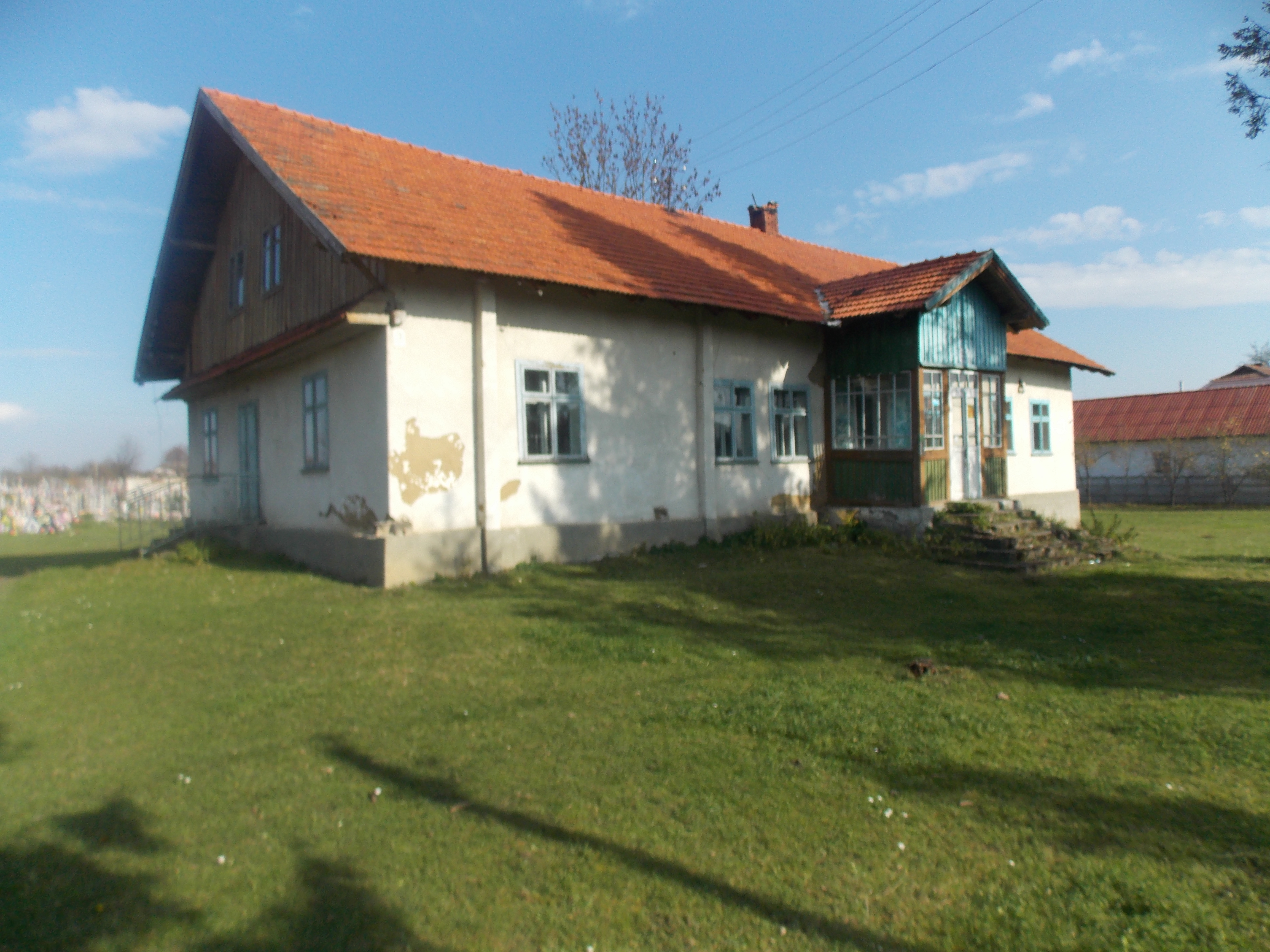 Будинок Кобринського Йосафата Миколайовича (1818–1901). Спочатку будівля була будинком Йосафата, після його смерті будівля відійшла селу Мишин, голова якого вирішив там зробити медпункт та пошту, сьогодні будівля пустує .